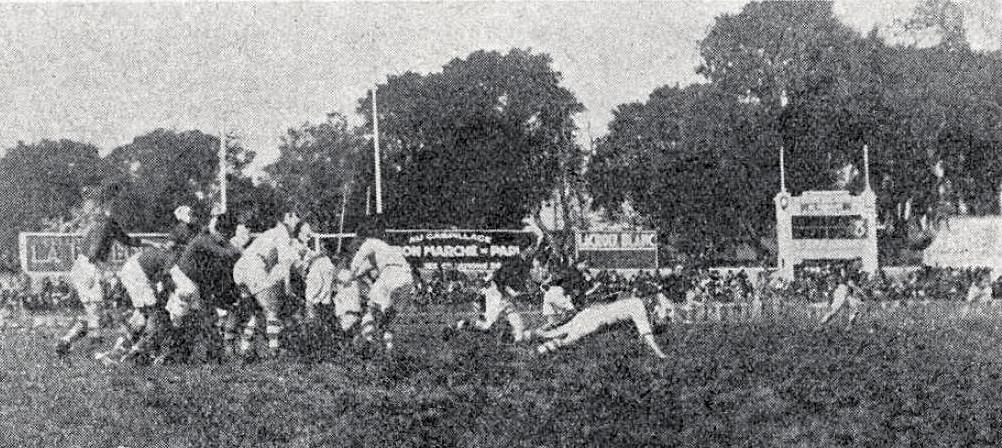 Lézignan (en blanc) en finale du championnat de France de rugby le 19 mai 1929 à Toulouse, relance du demi de mêlée Roger Llary.